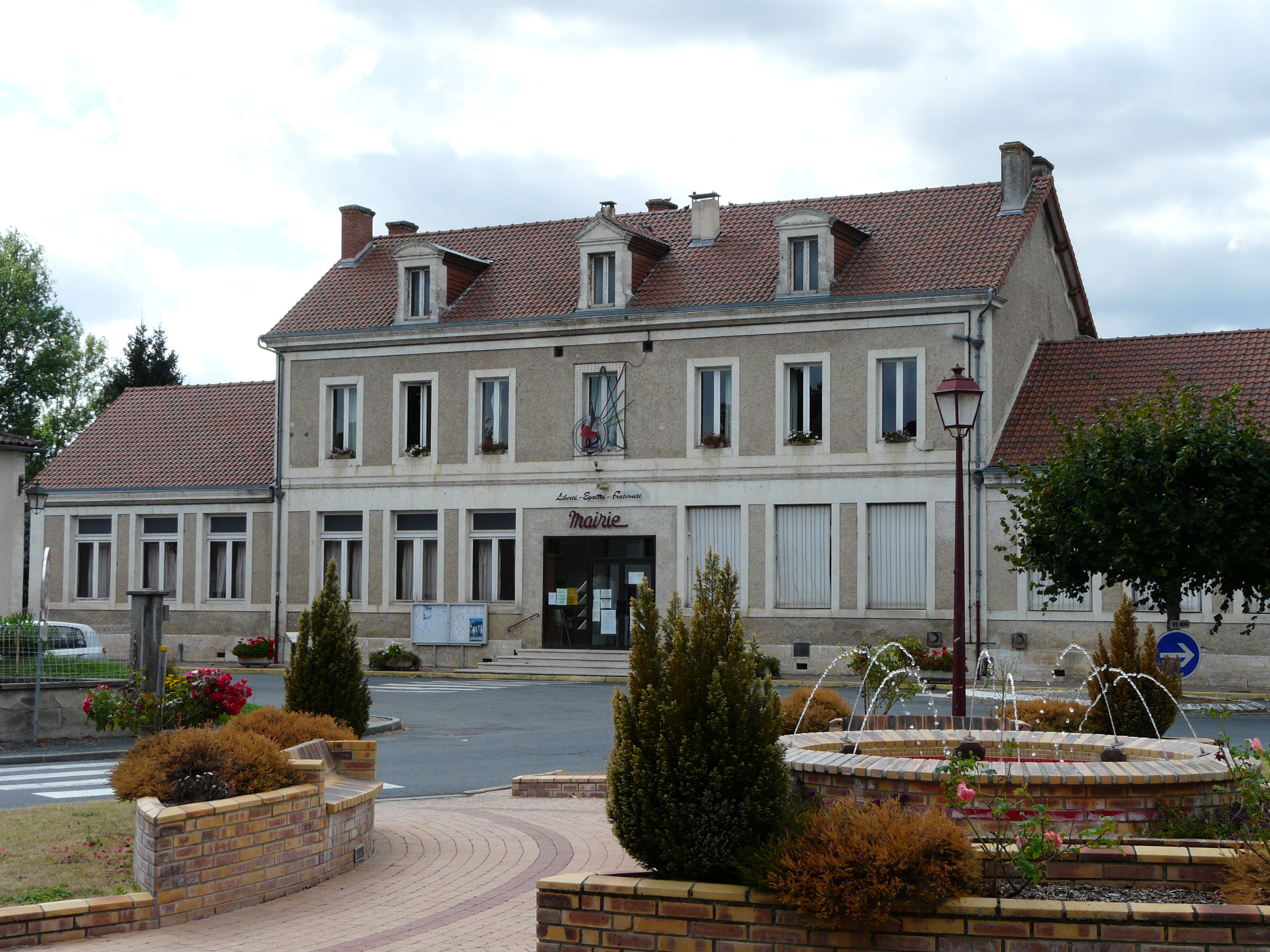 La mairie de Saint-Léon-sur-l'Isle, Dordogne, France.